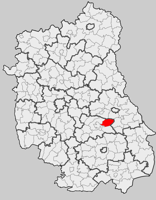 Map of gmina Siennica Różana, Krasnystaw county, Lublin voivodship Mapa gminy Siennica Różana, powiat krasnostawski, województwo lubelskie